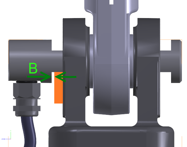 Kraftmessbolzen Einbau